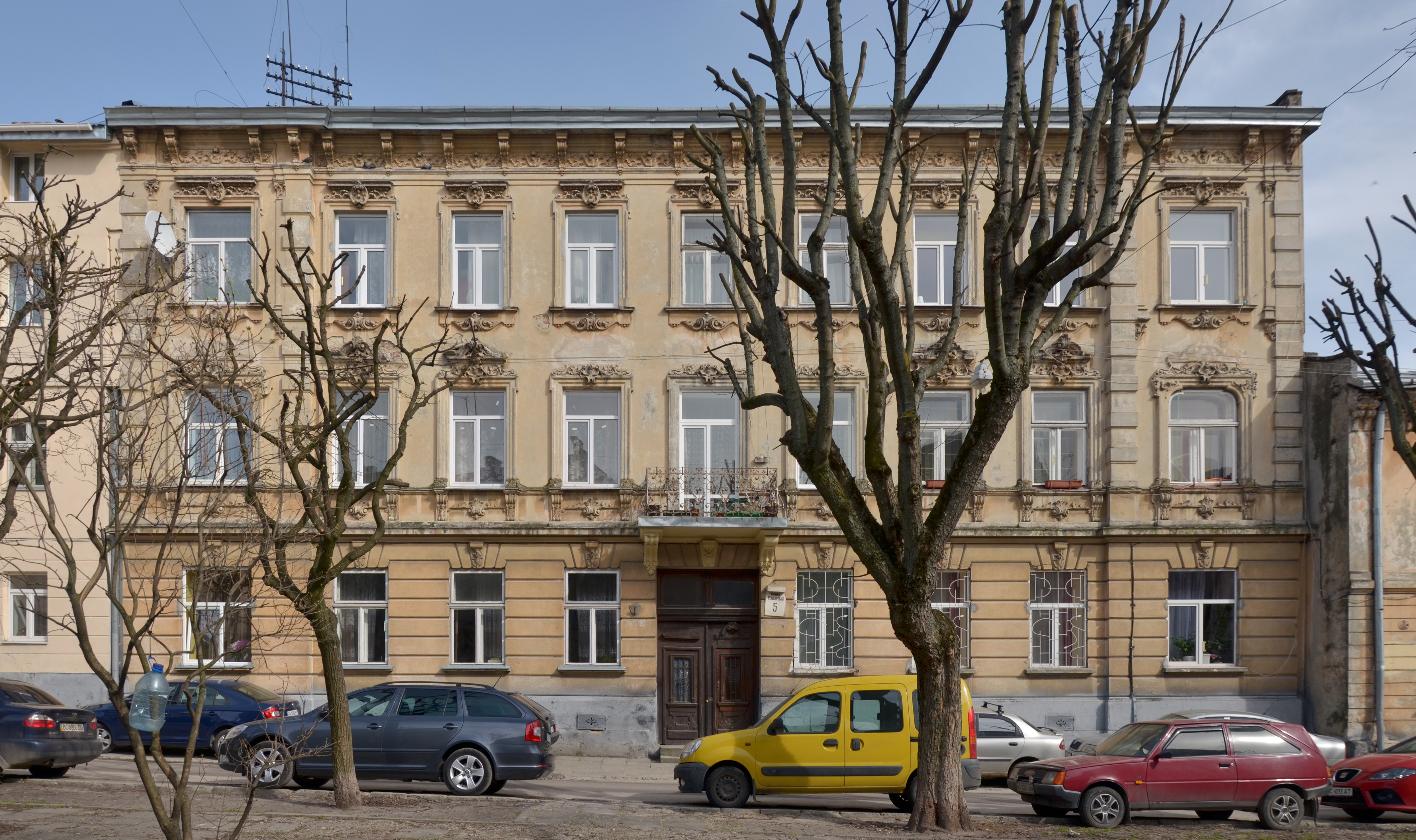 Будинок № 5 на вулиці Різьбярській у Львові.